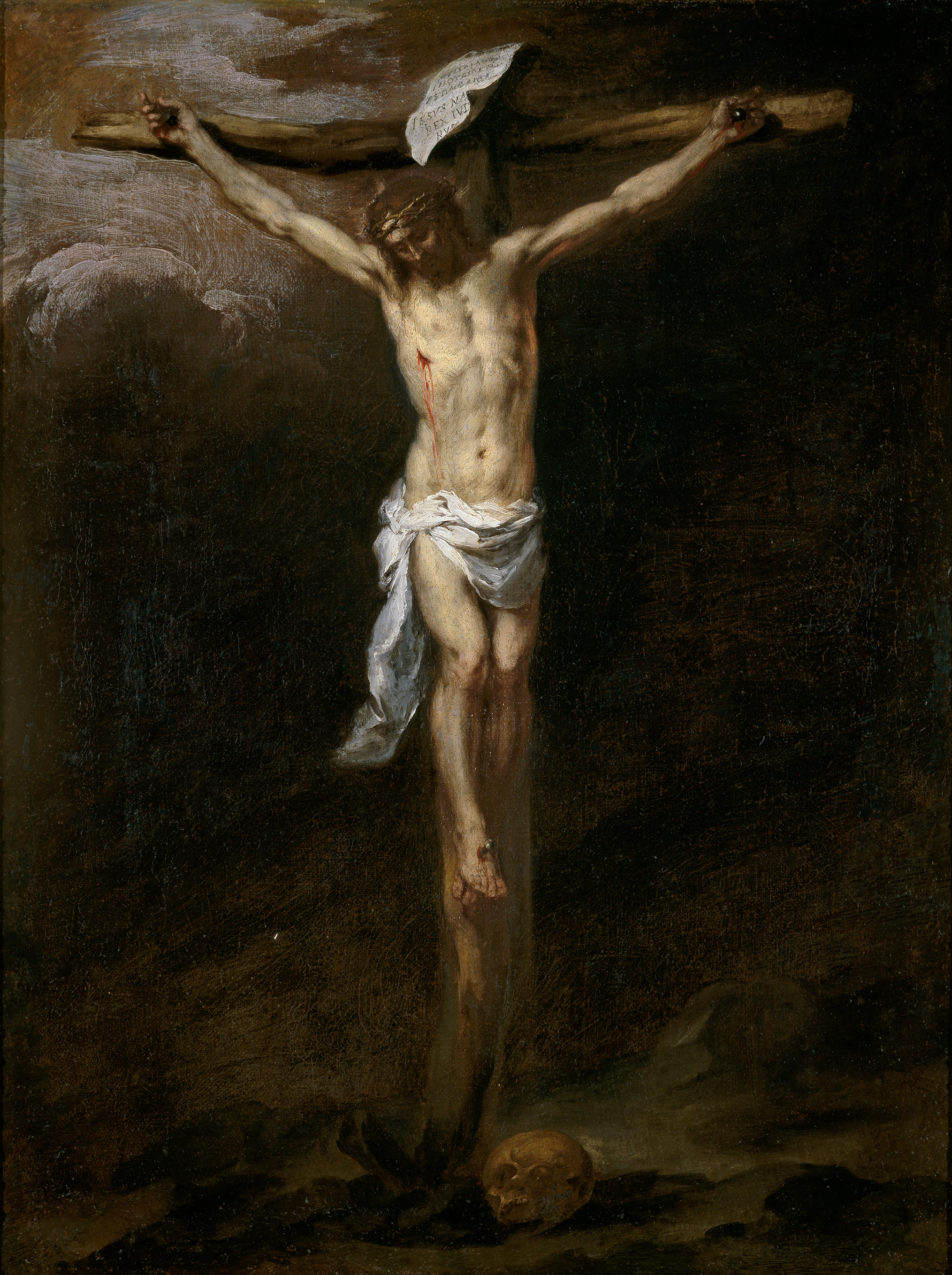 El lienzo representa a Cristo crucificado en el Monte Calvario, y es uno de los dos Crucificados de Bartolomé Esteban Murillo que se conservan en el Museo del Prado.